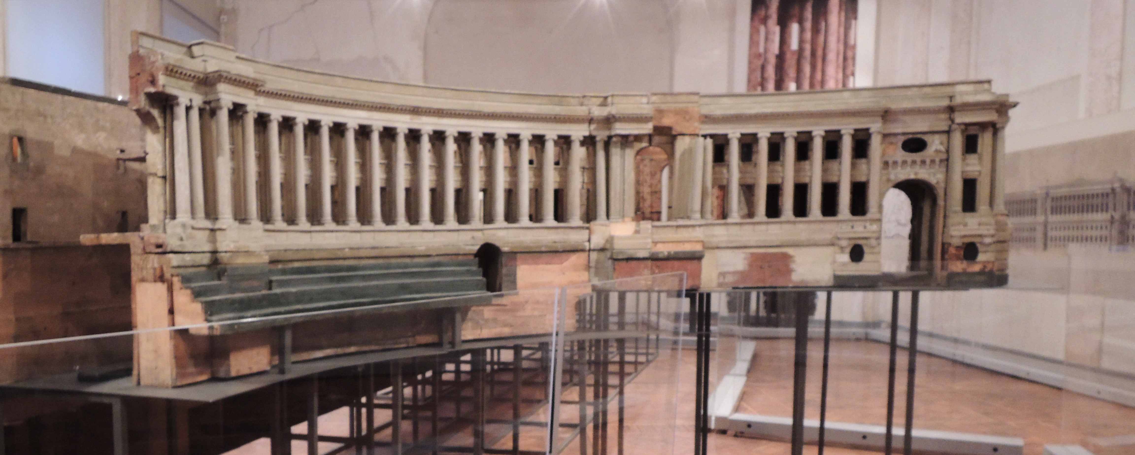 Большой Кремлевский дворец В.И. Баженова